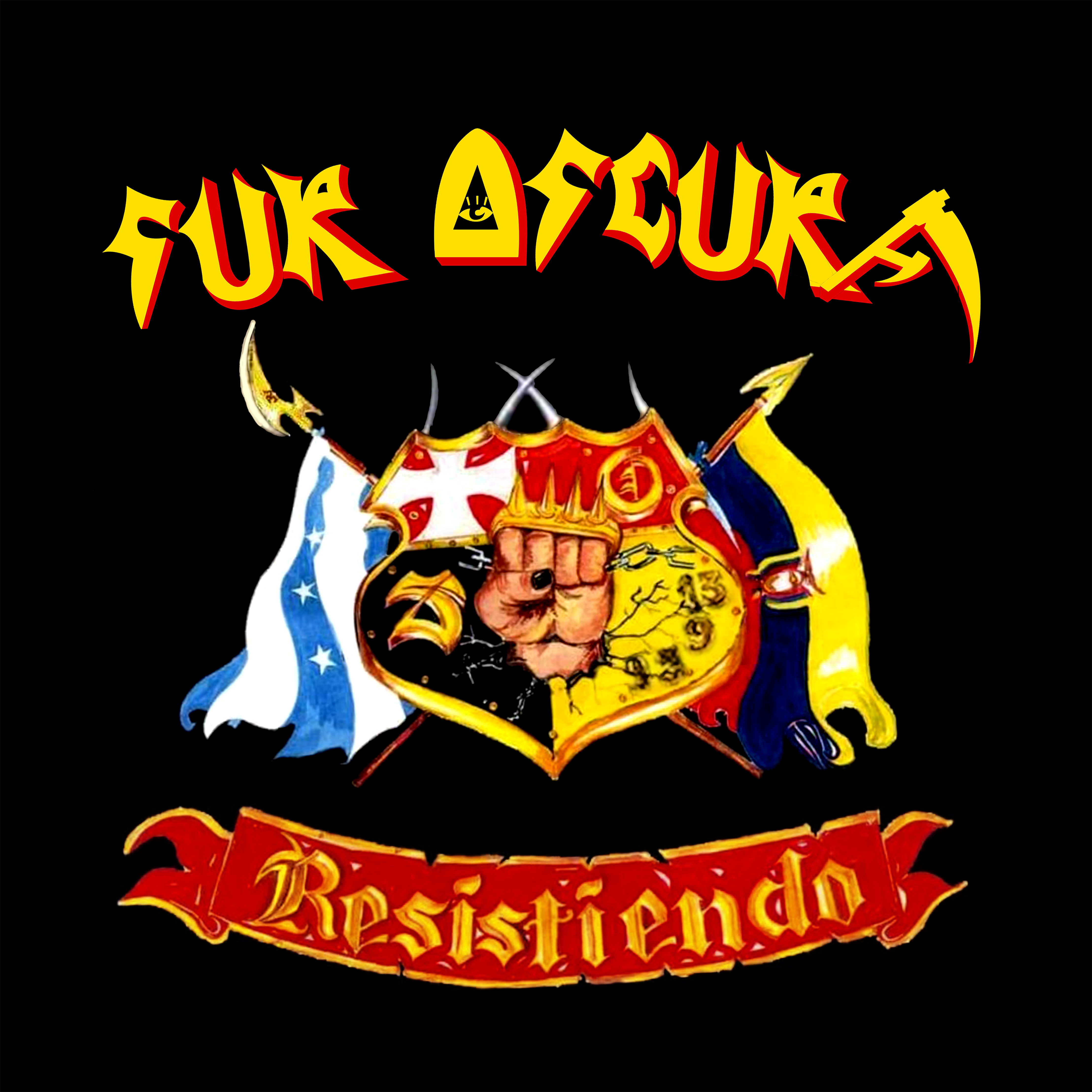 Escudo de la Sur Oscura